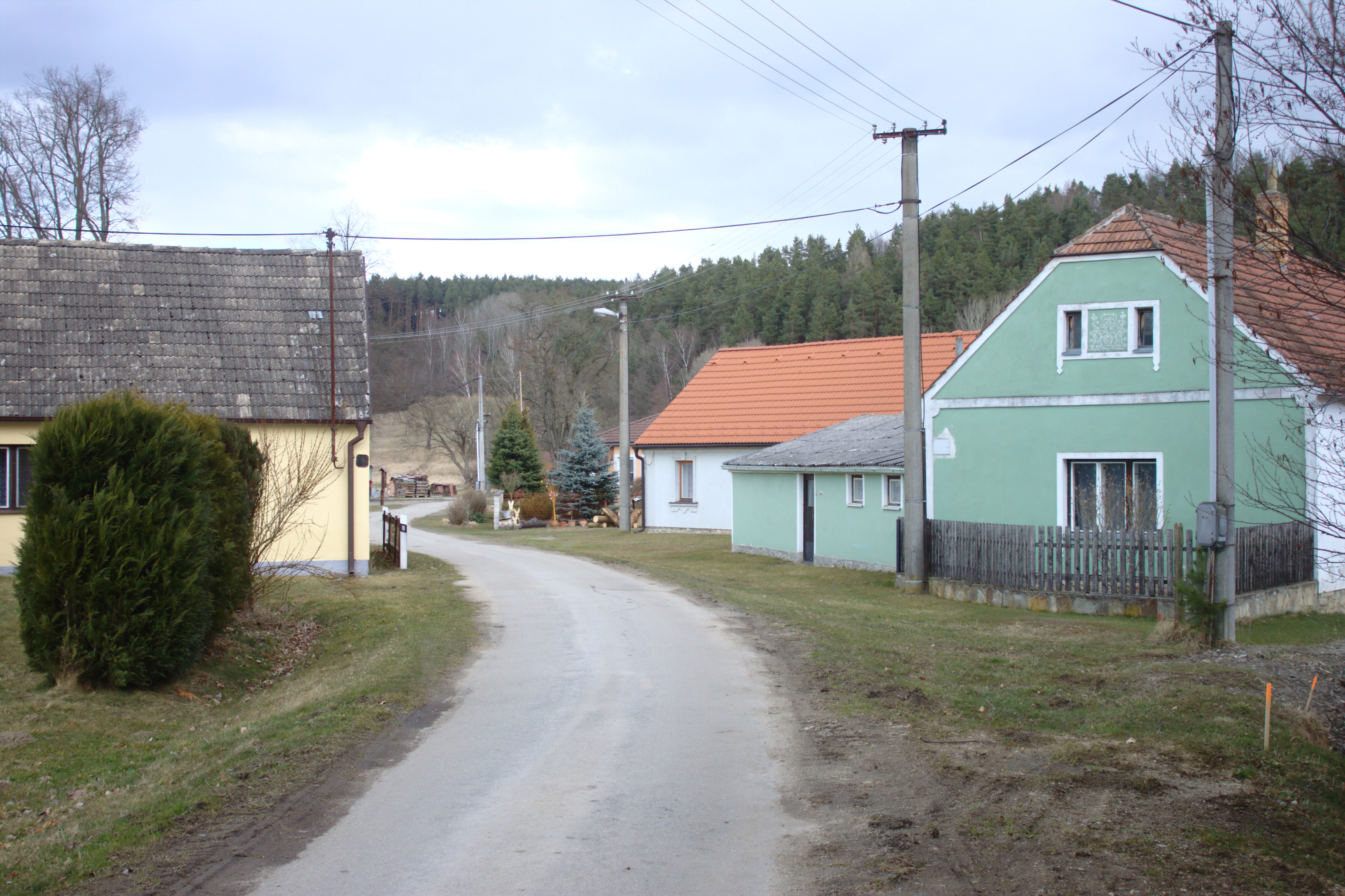 Okraj vesnice Nežetice, Jihočeský kraj Project: Fotíme Česko